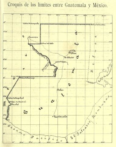 Primer mapa de los límites establecidos entre Guatemala y México de acuerdo al tratado Herrera-Mariscal.